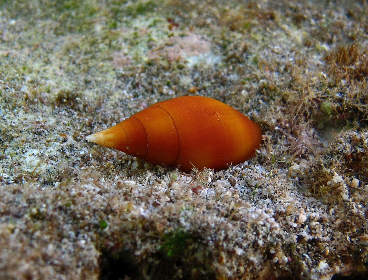 Un Nebularia acuminata (ex-Mitra acuminata) à la Réunion.